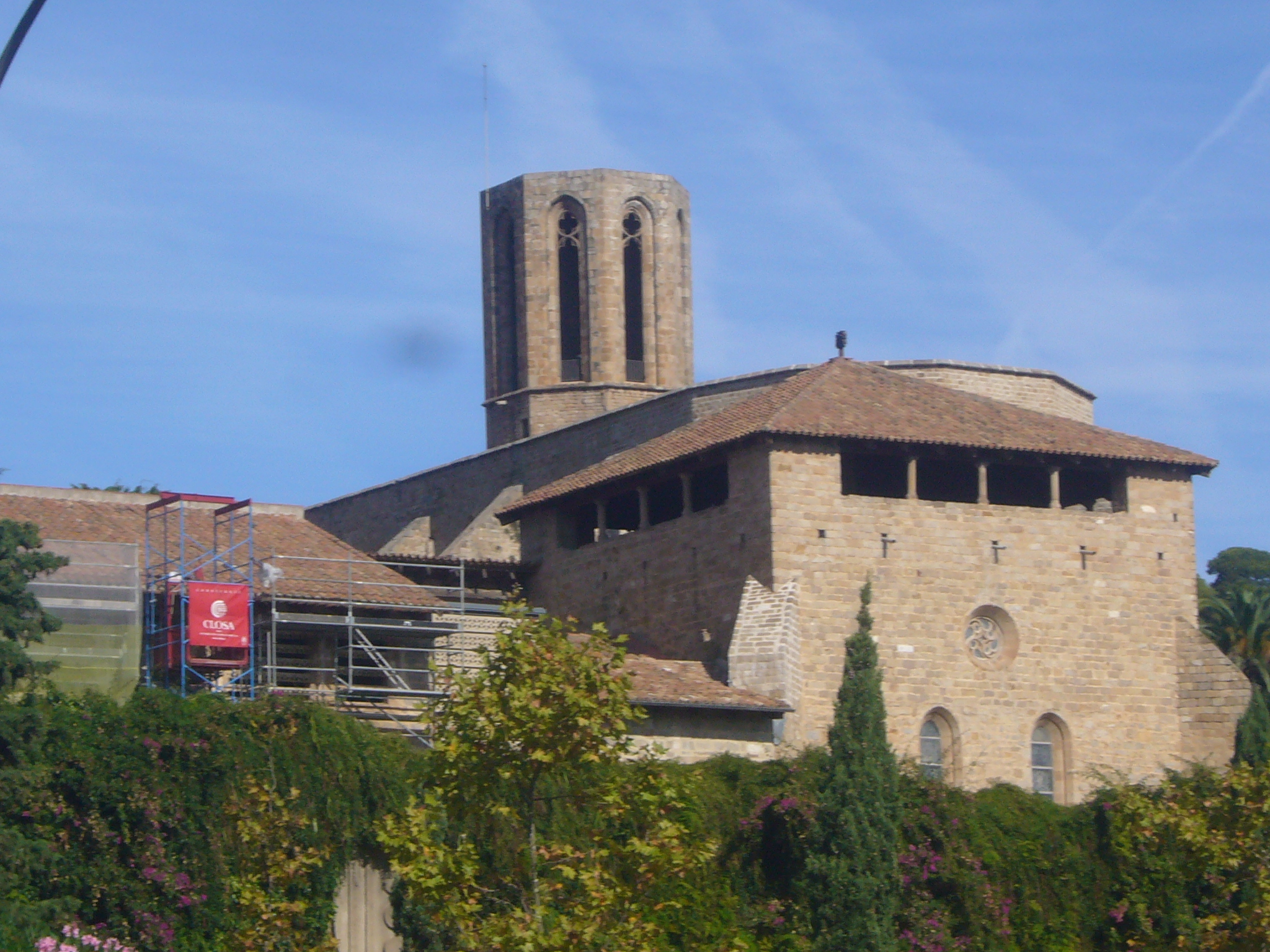 Monestir de Pedralbes vist des de l'avinguda Pedralbes